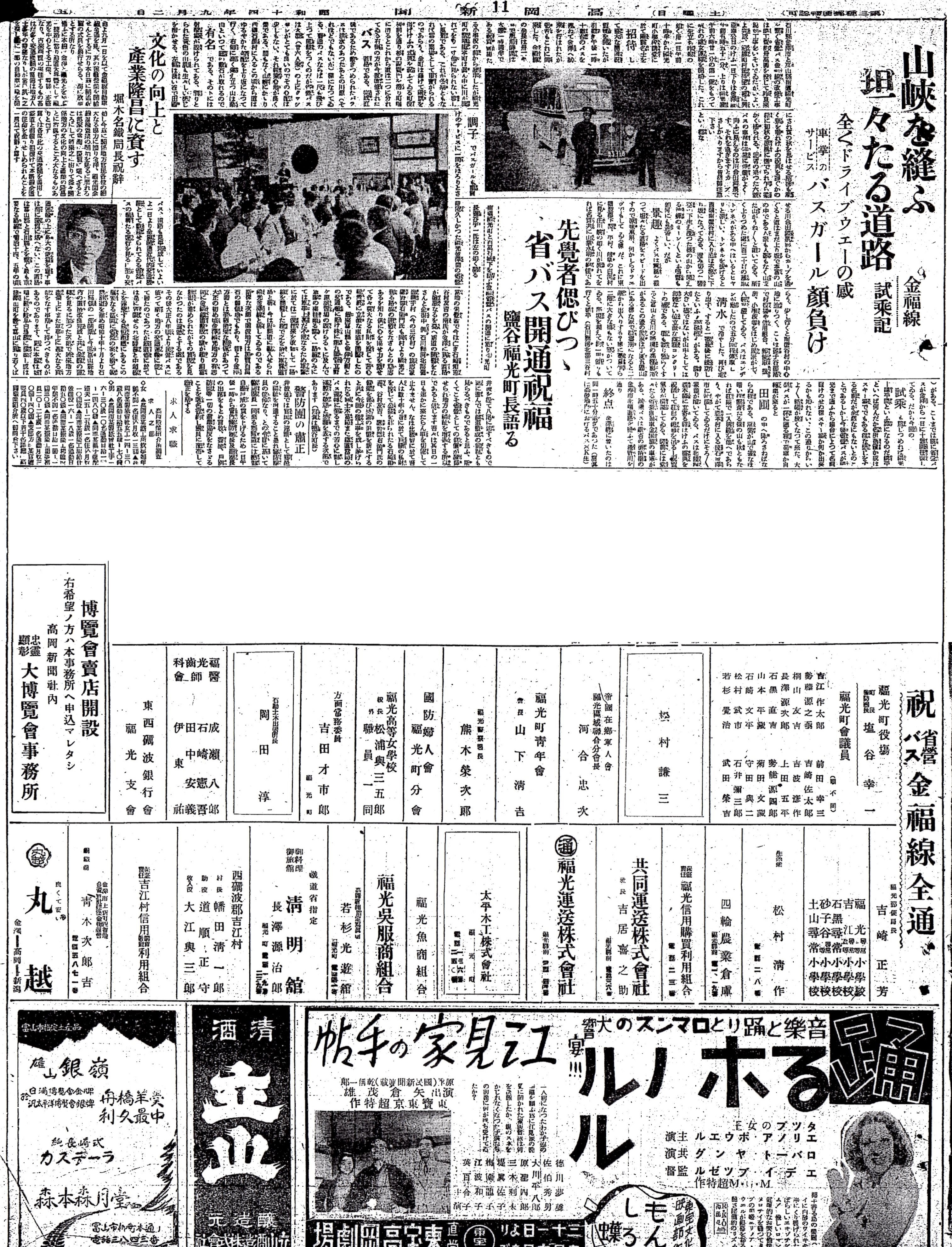 省営自動車金福線開通記事。なお、中段の小説掲載部分は著作権上の理由により削除した